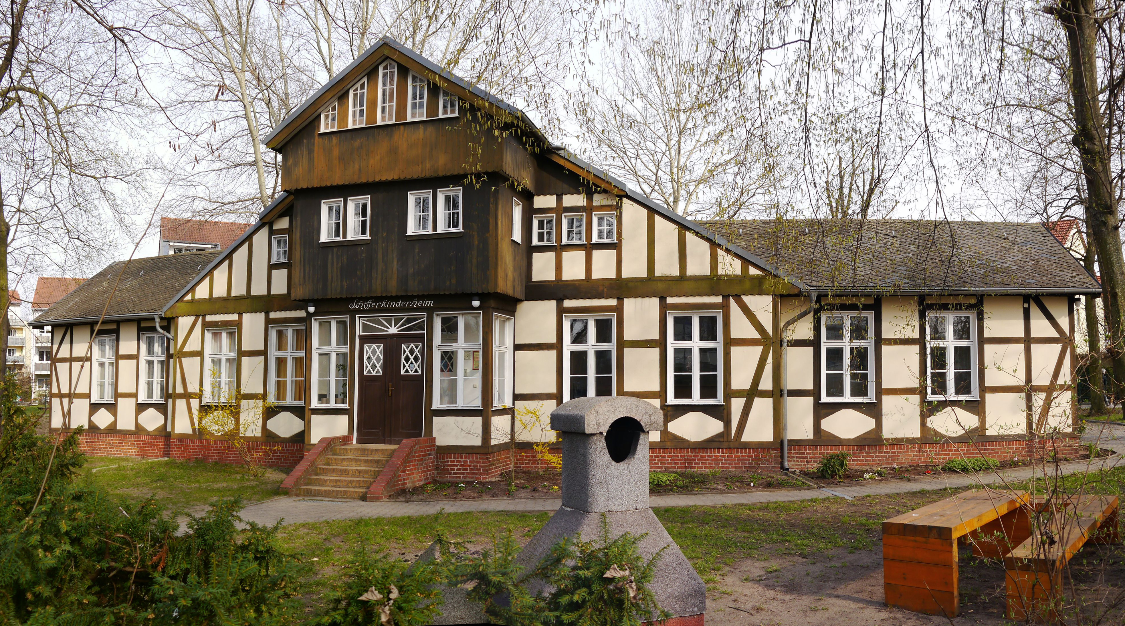 Baudenkmal: Schifferkinderheim Teltow, Oderstraße 209